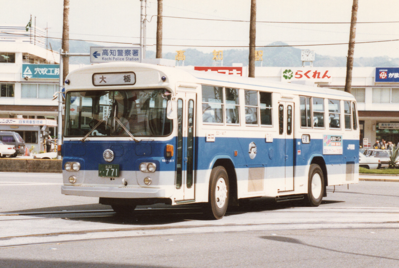 大栃線 高知駅前にて撮影